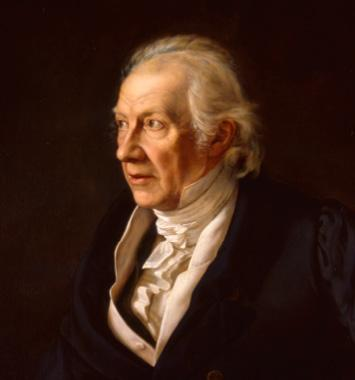 Depicted person: Carl Friedrich Zelter